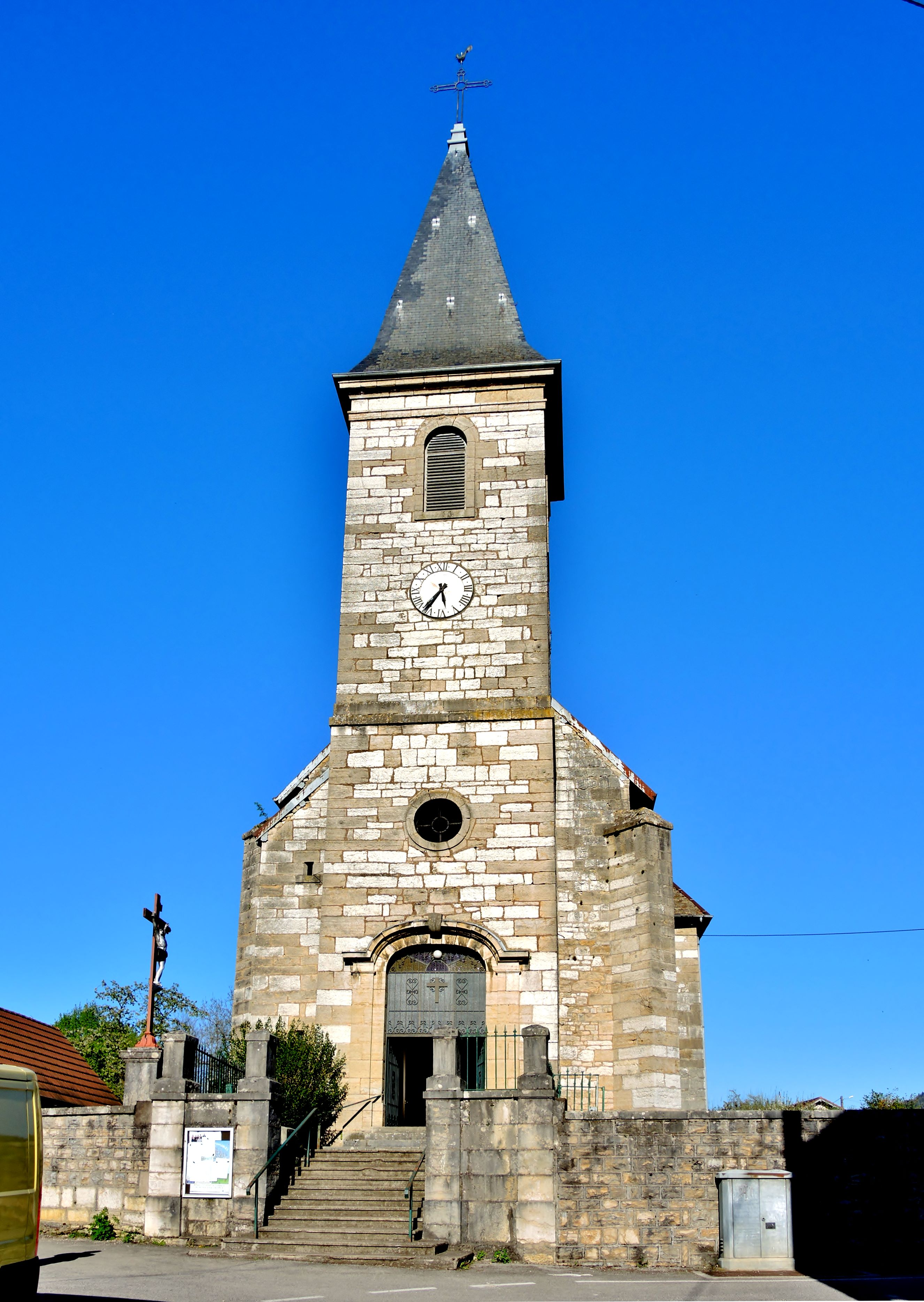 Eglise Saint bPierre et saint Paul de Vaire-Arcier. Doubs